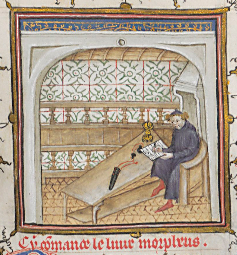 Iluminura Guillaume de Machaut écrivant de Le Dit de la Fonteinne Amoureuse nas obras completas de Guillaume de Machaut